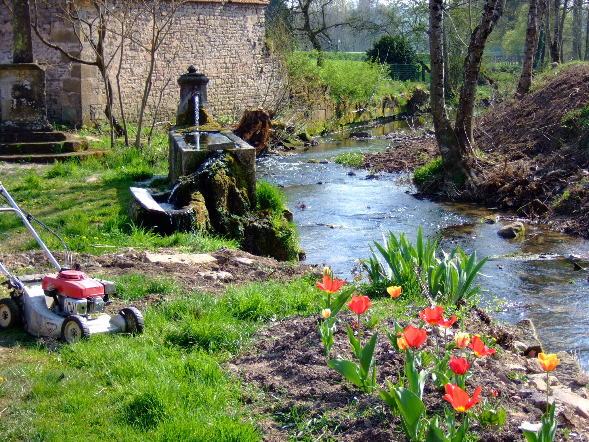 Fontaine à Tignécourt, Vosges, France